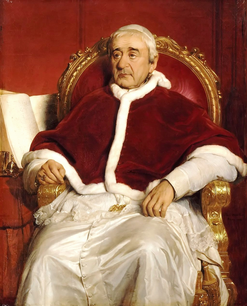 Portrait du pape Grégoire XVI par Paul Delaroche